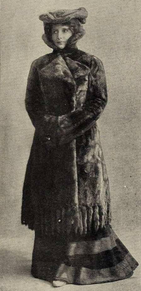 Neue Pelzmoden 1901 [1910?]. Hierzu 6 photographische Aufnahmen. 5. Halblanger Pelzmantel aus kanadischem Marder.